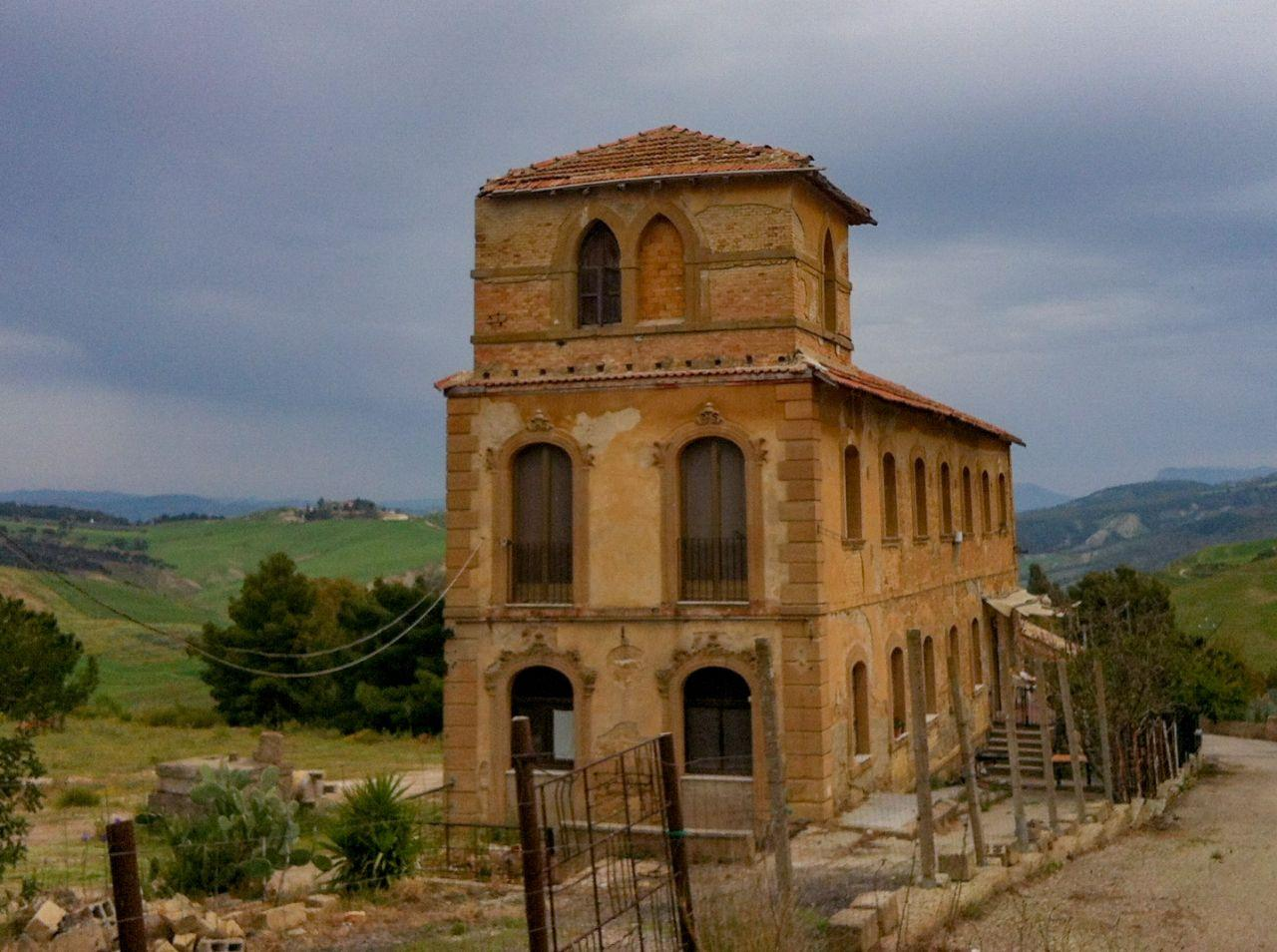 Edificio in rovina nella solfara Trabonella, Caltanissetta